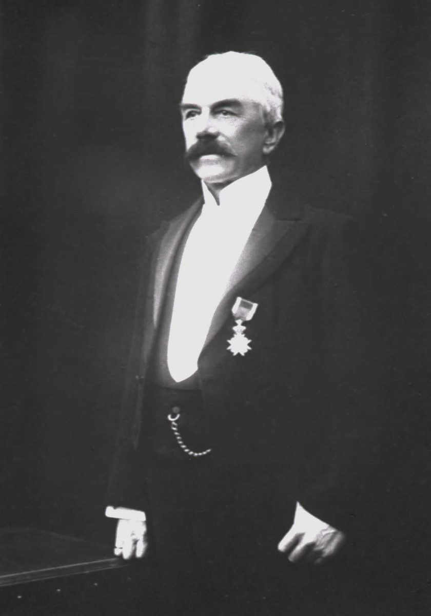 Portrett av Nicolay Nicolaysen Sontum